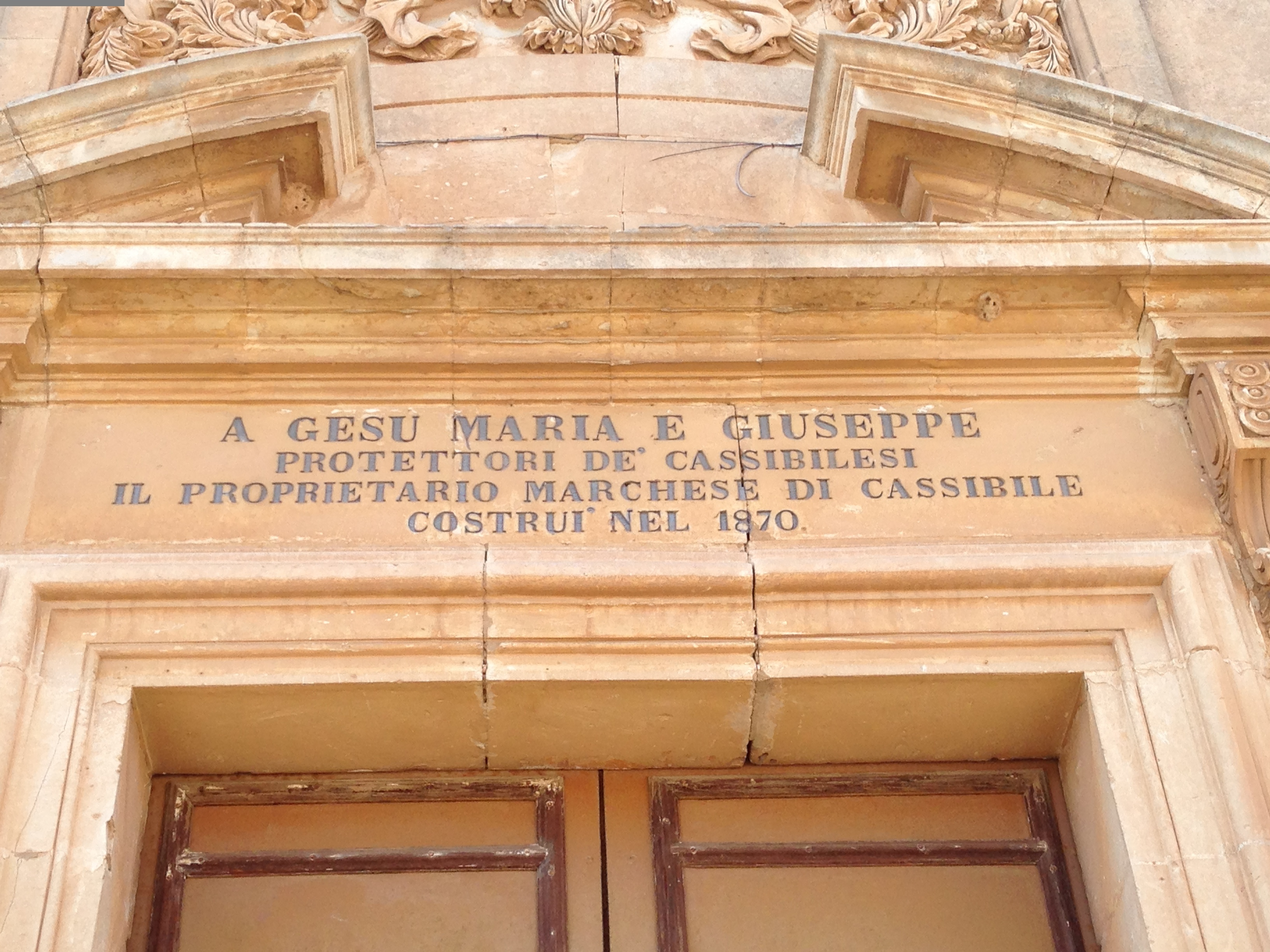 Dedica della Chiesa della Sacra Famiglia di Cassibile